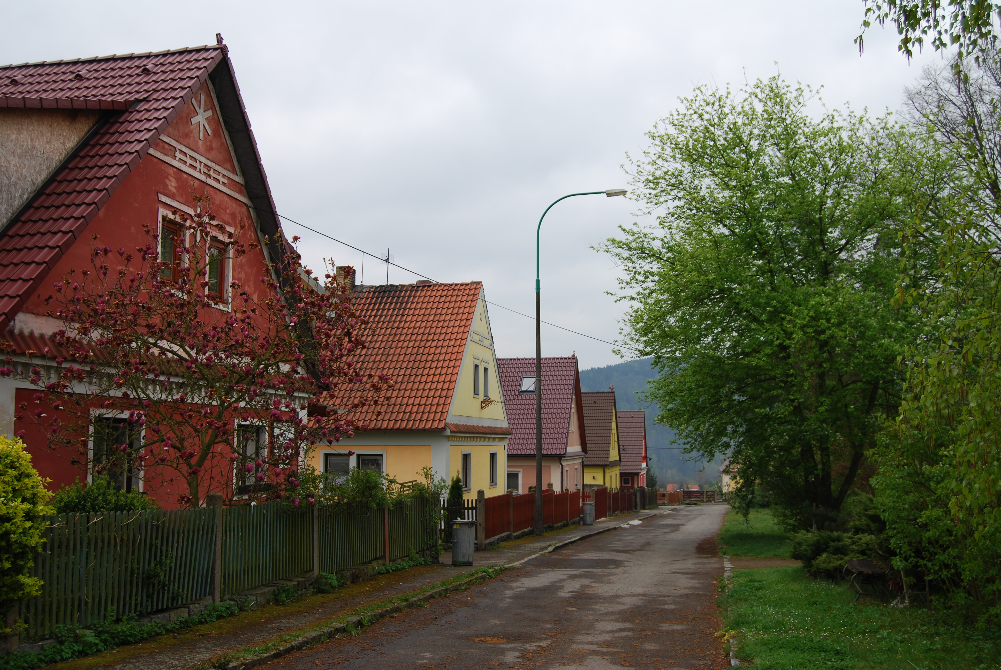 Domy ve vesnici. Zvírotice je vesnice, část obce Dublovice v okrese Příbram. Česká republika.